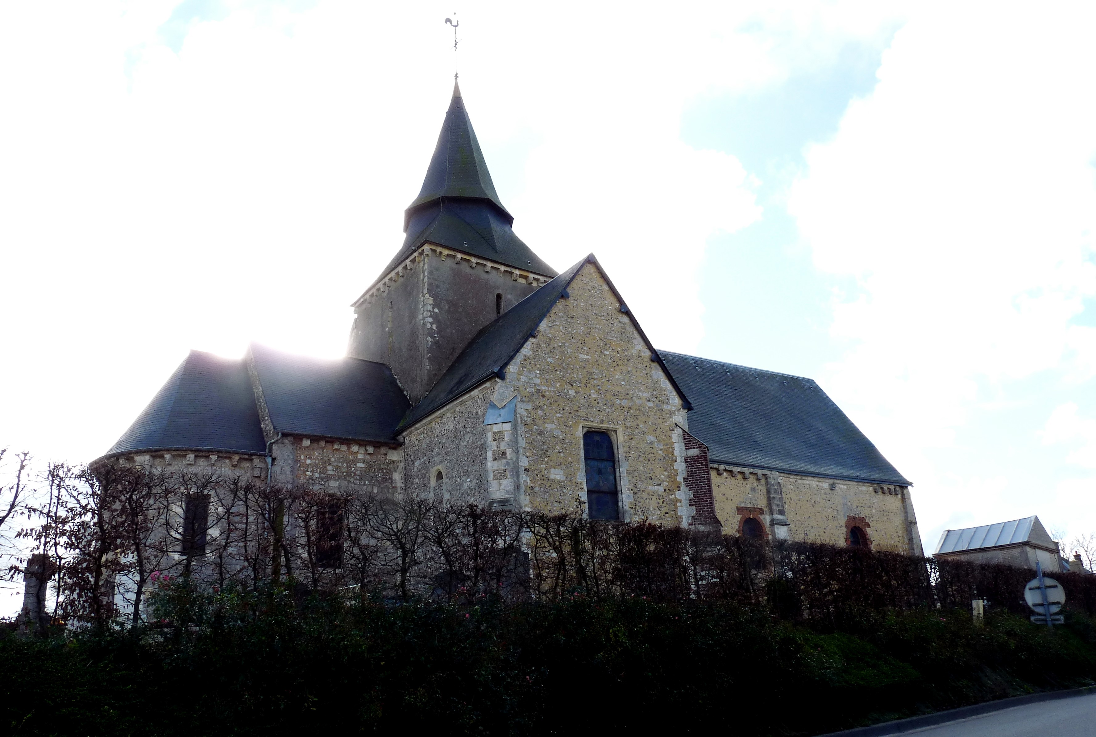 Église Saint-Pierre de Graimbouville .